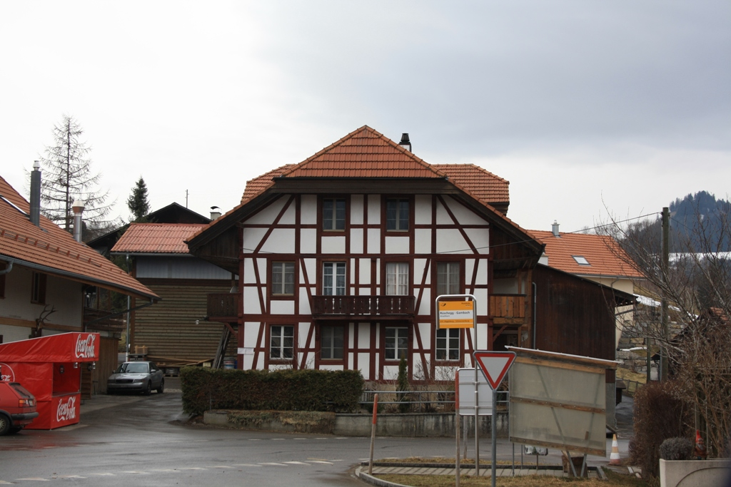 Rüschegg, Kanton Bern, Schweiz